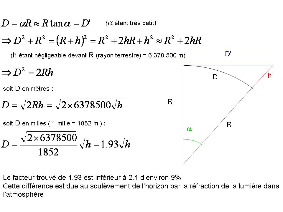 démonstration distance de l'horizon pour un observateur à une hauteur h au dessus du sol author : New Dog own work